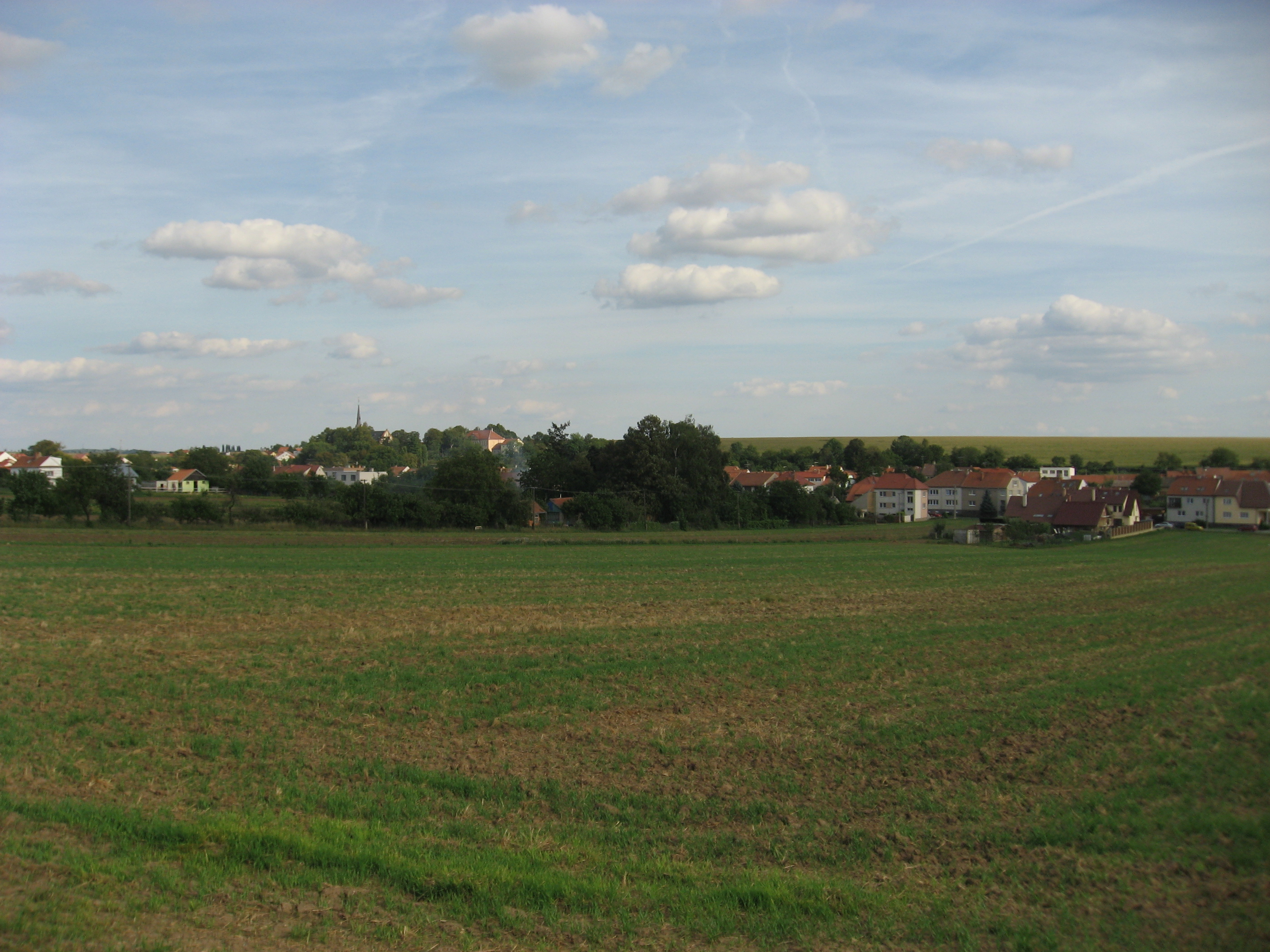 Podolí